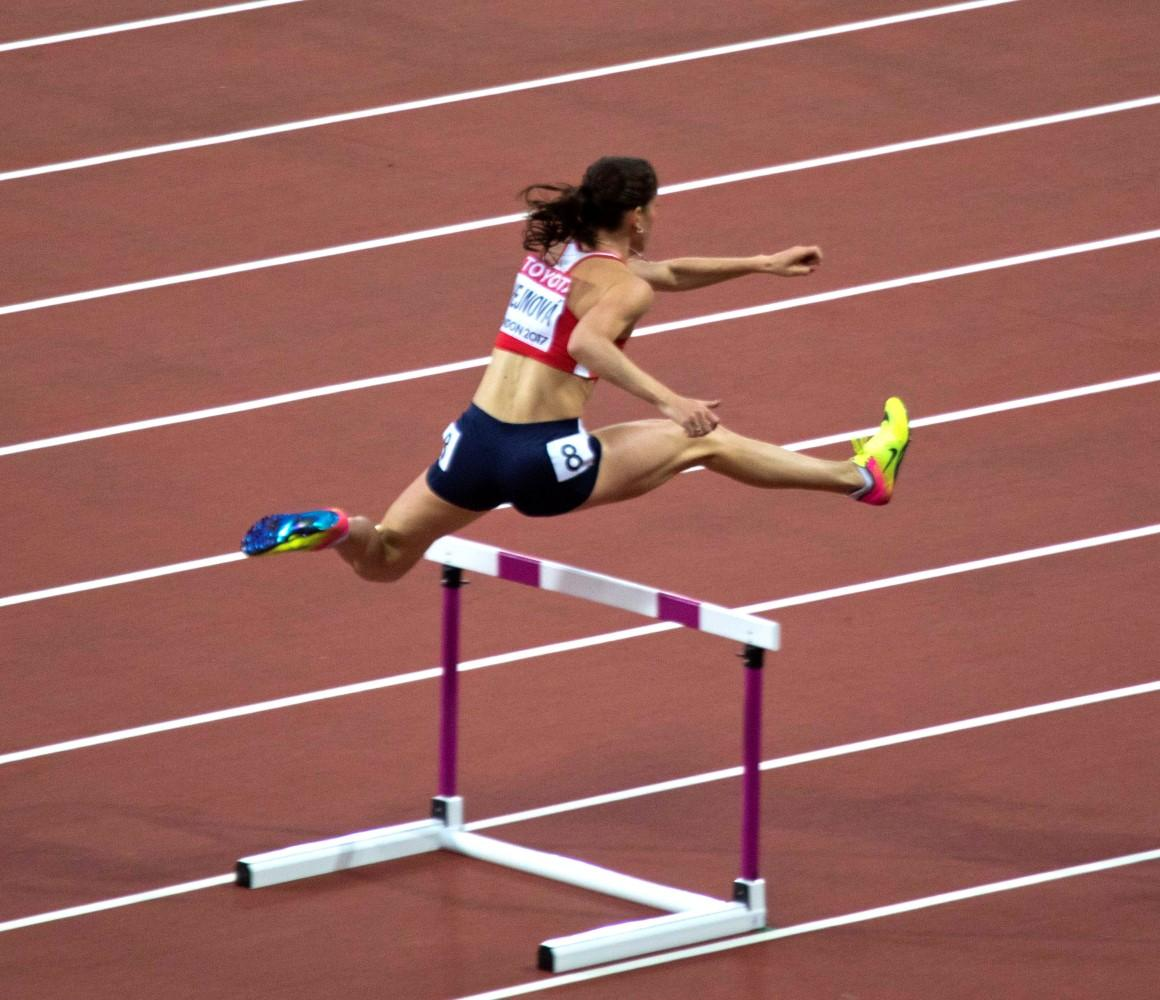 d3_2 400H hejnova